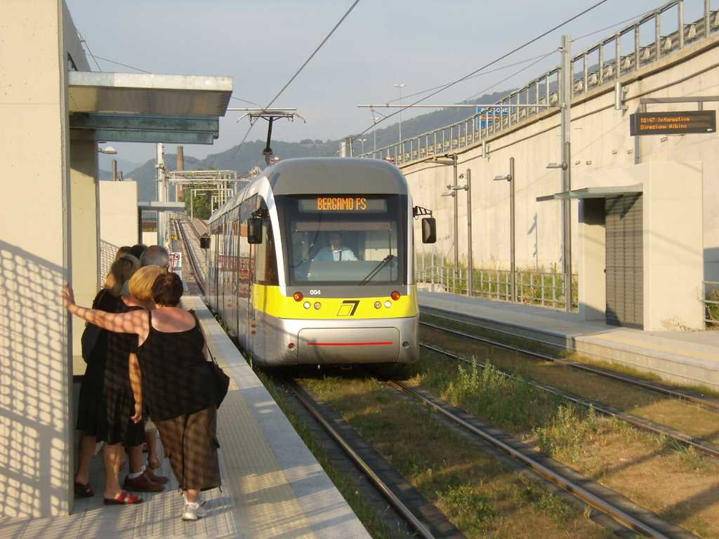 Tranvia Bergamo-Albino alla fermata di Pradalunga